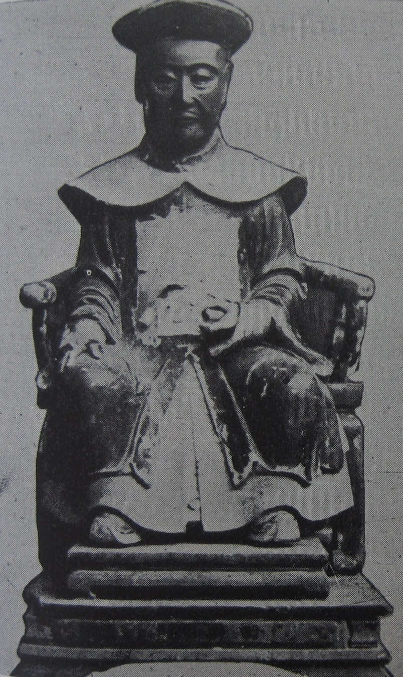 宜蘭天后宮裡的前臺灣道楊廷理像